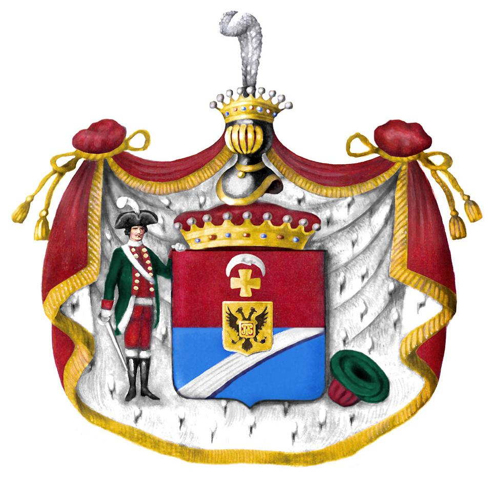 герб рода Каменских, манускрипт, Архив Каменских, Москва